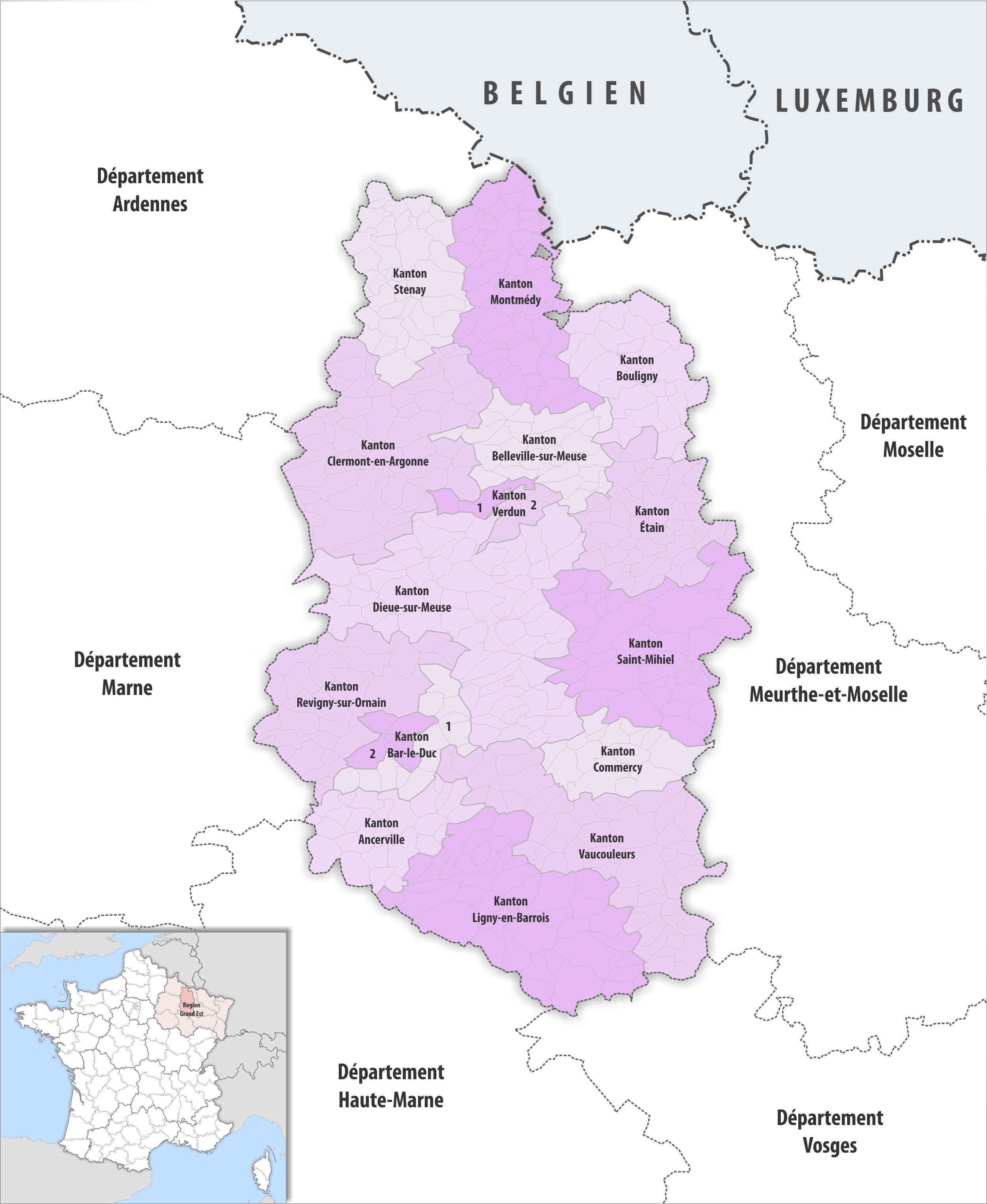 Gemeinden und Kantone im Departement Meuse